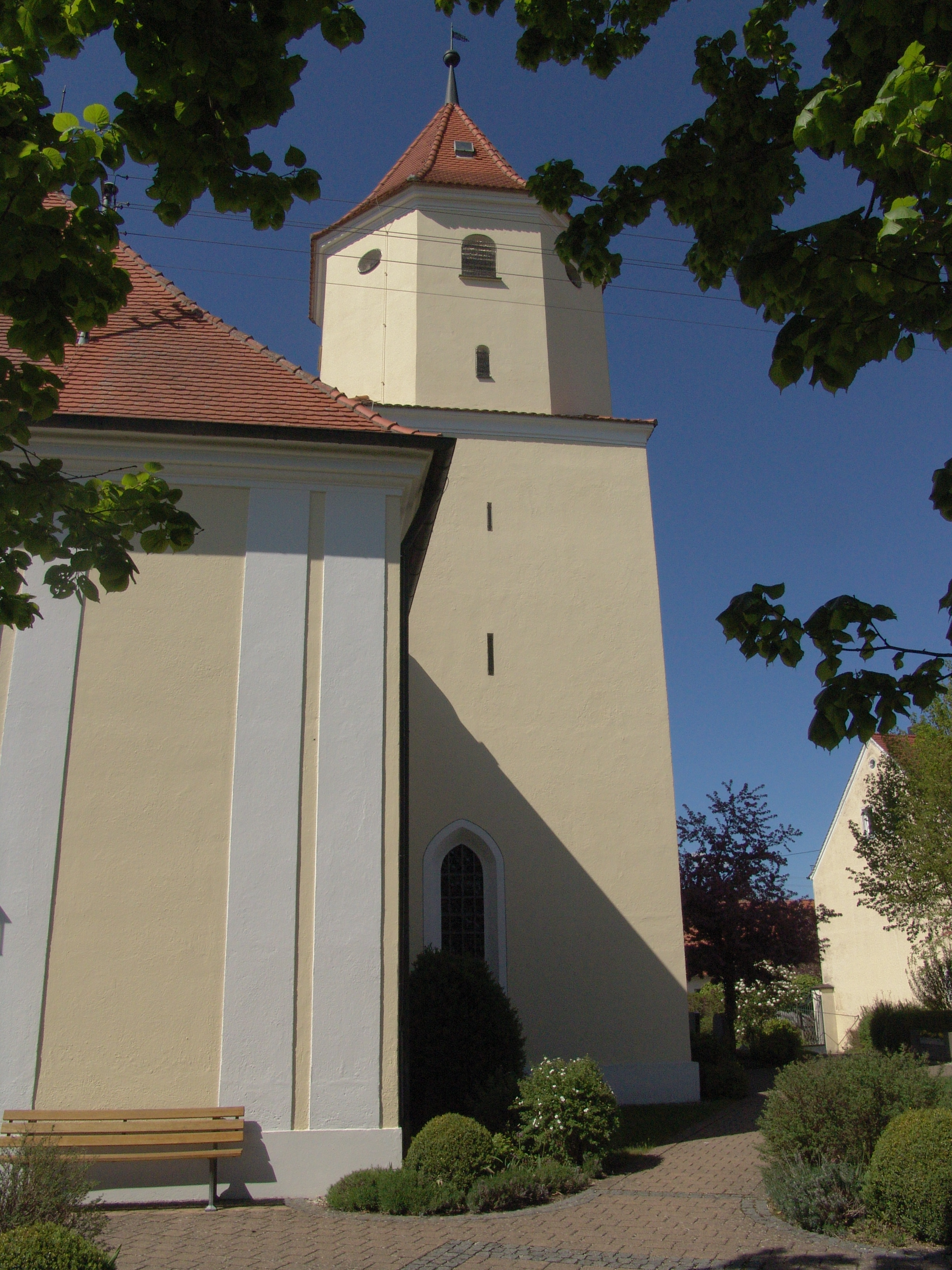 evang.-luth. Kirche St. Gallus in Baldingen